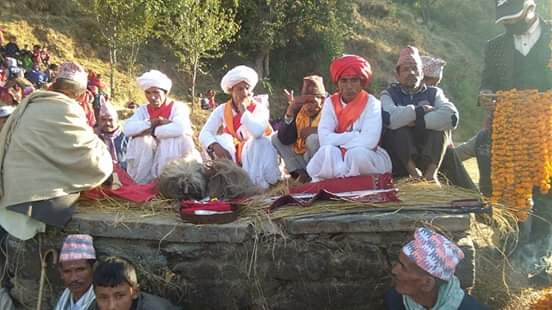 नेपाल भाषा: Mohanyal Dewata Manikot Nepal